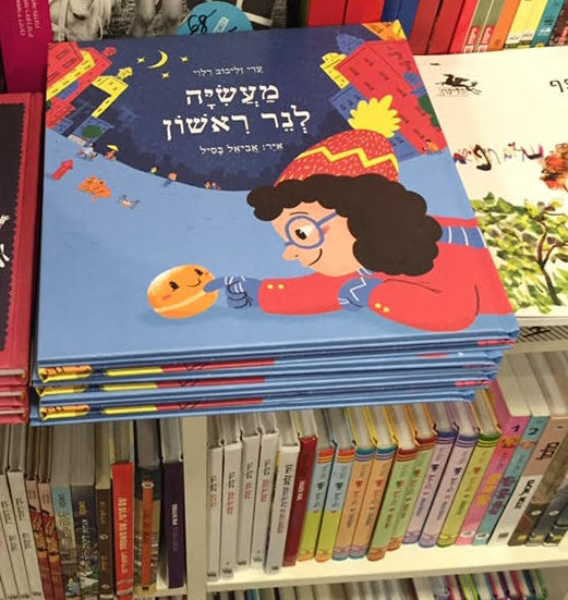 מעשיה לנר ראשון